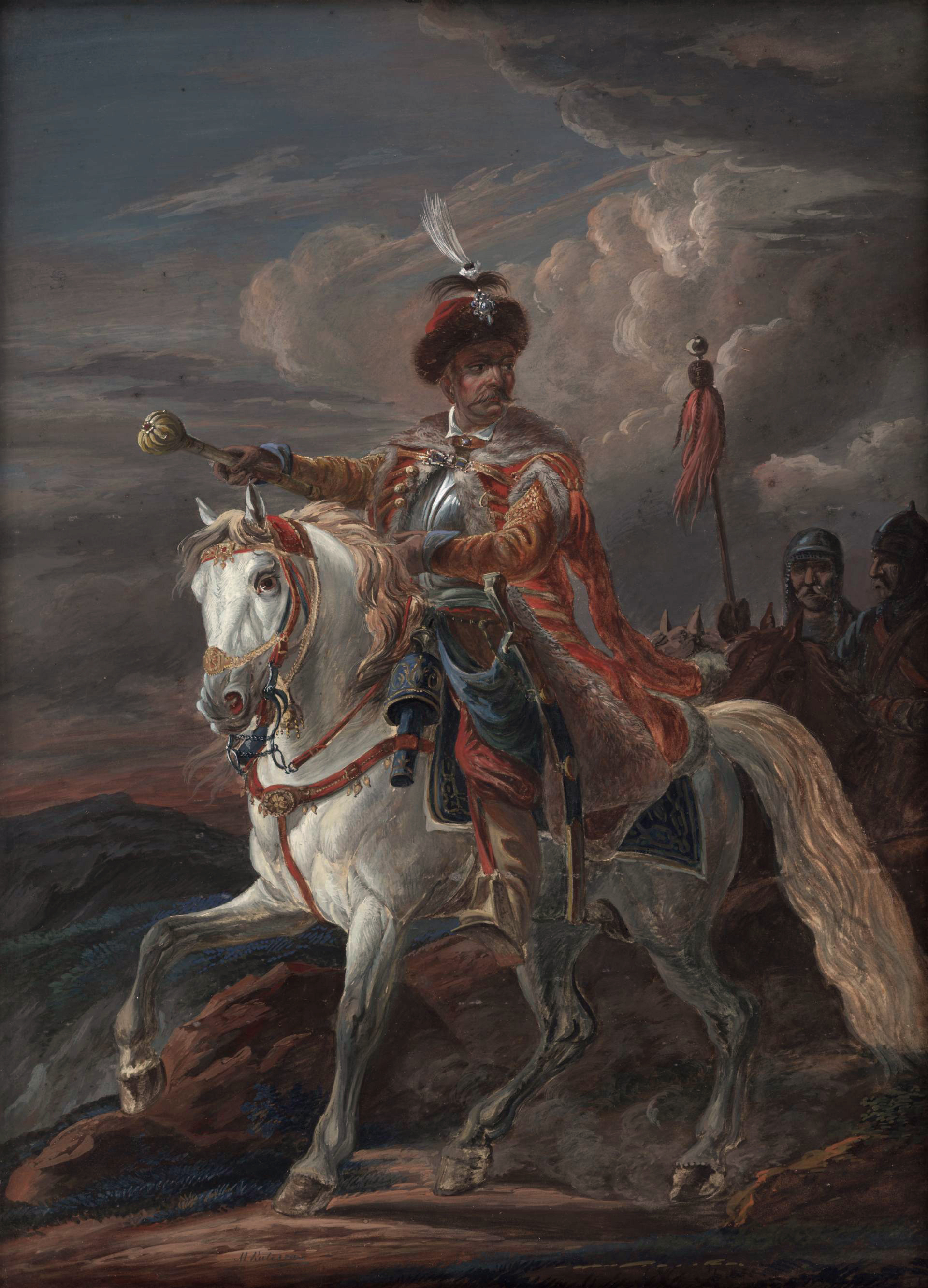 Беларуская (тарашкевіца): Гетман (Hietman)